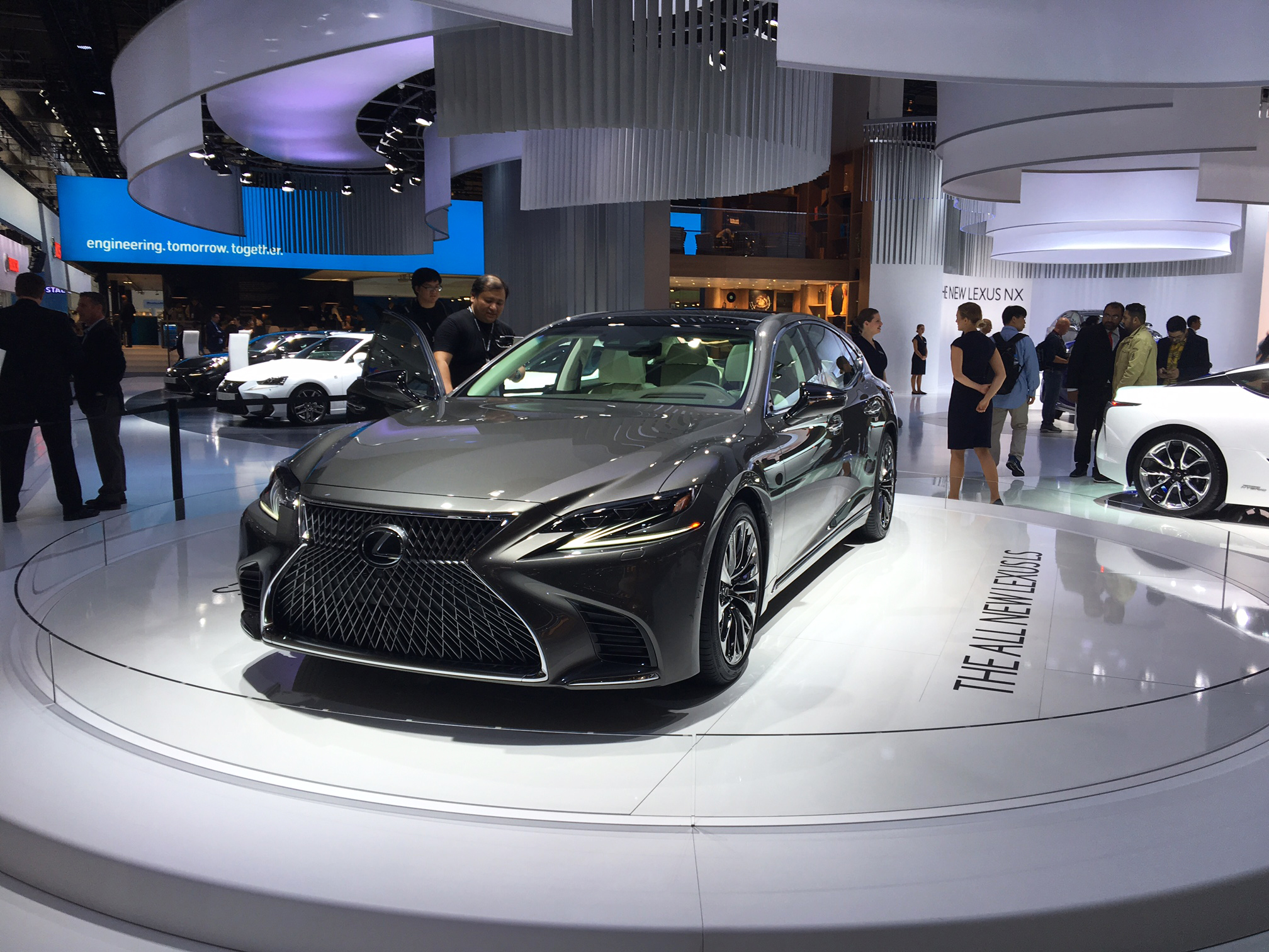 Lexus LS 500, Frankfurt Motor Show 2017